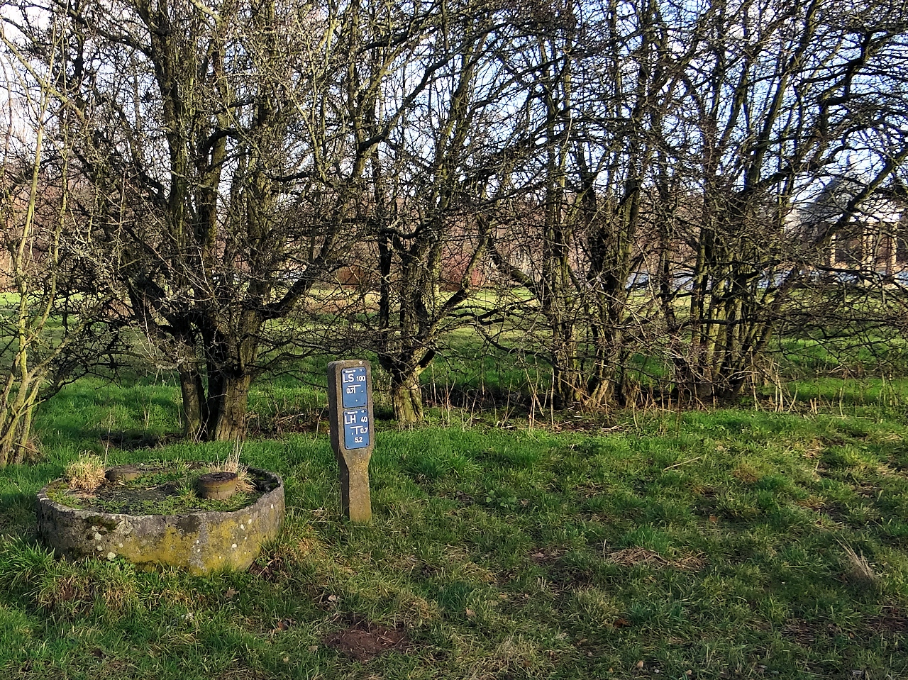 Schieberschächte und Kennzeichnungen der Wasserleitungen im südwestlichen Kennelgebiet, im Hintergrund ist der Säulentempel am Spielmannsteich erkennbar.